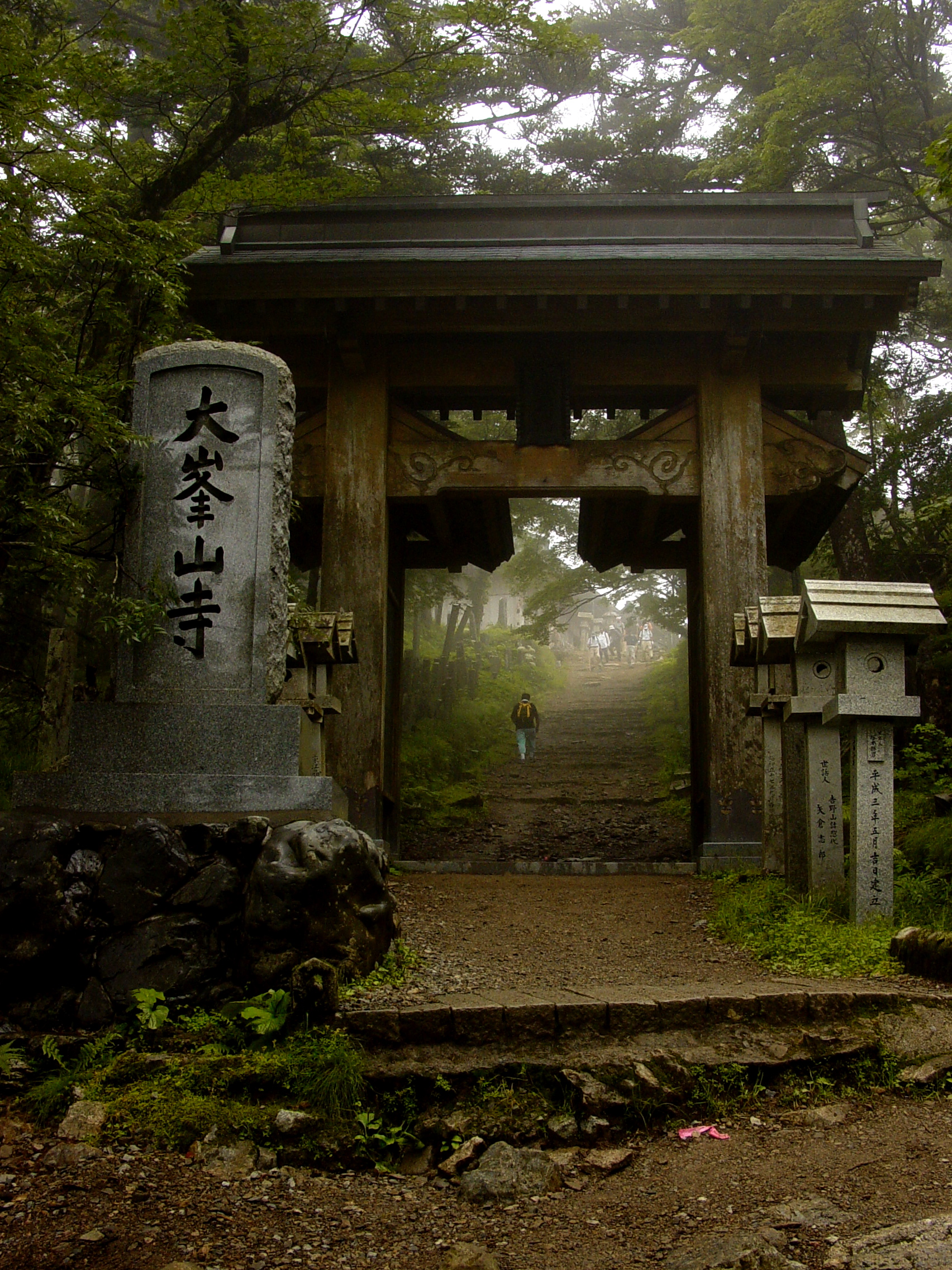 Oominesanji(大峯山寺), Nara, Japan